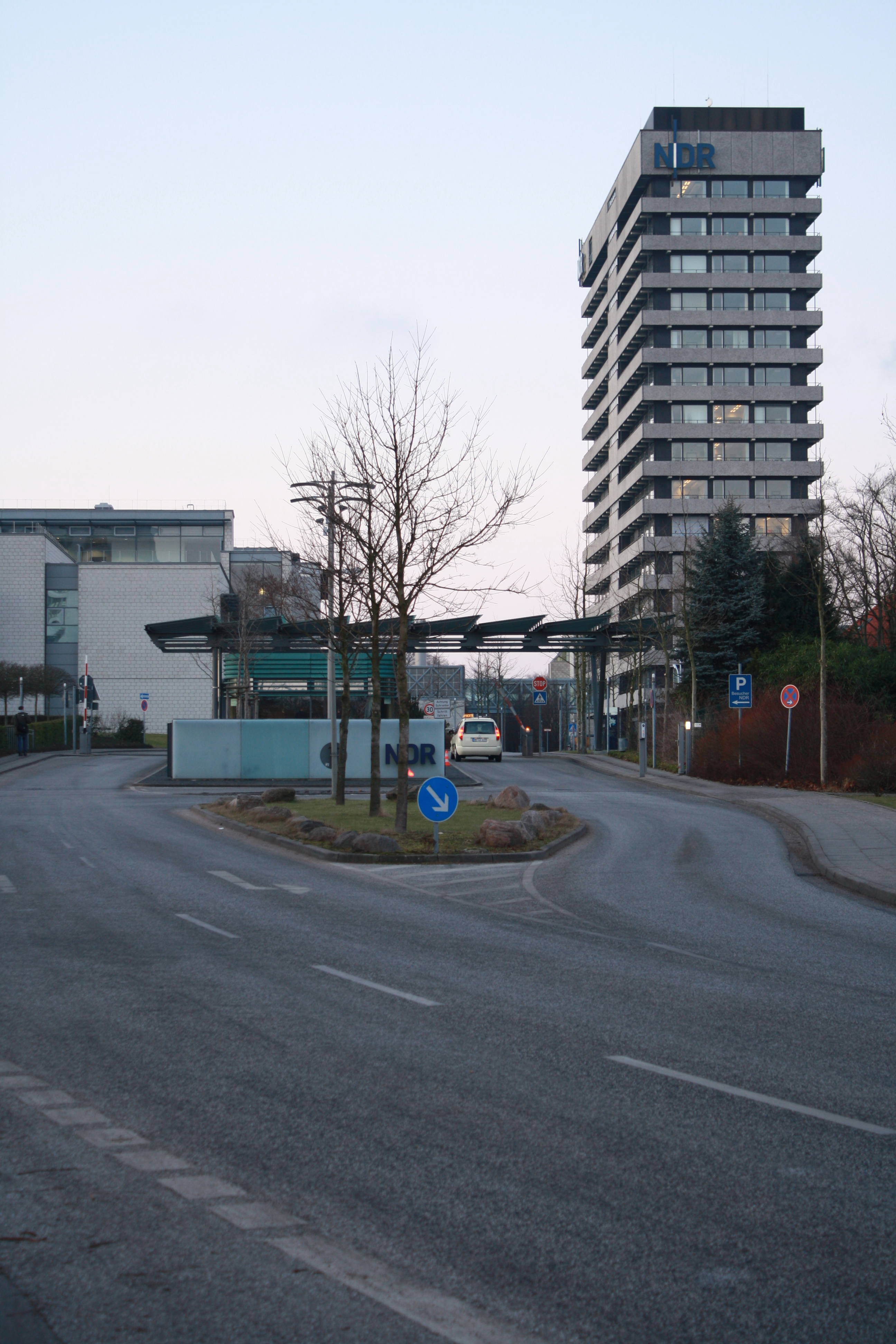 Haupteinfahrt des Geländes vom NDR Fernsehen